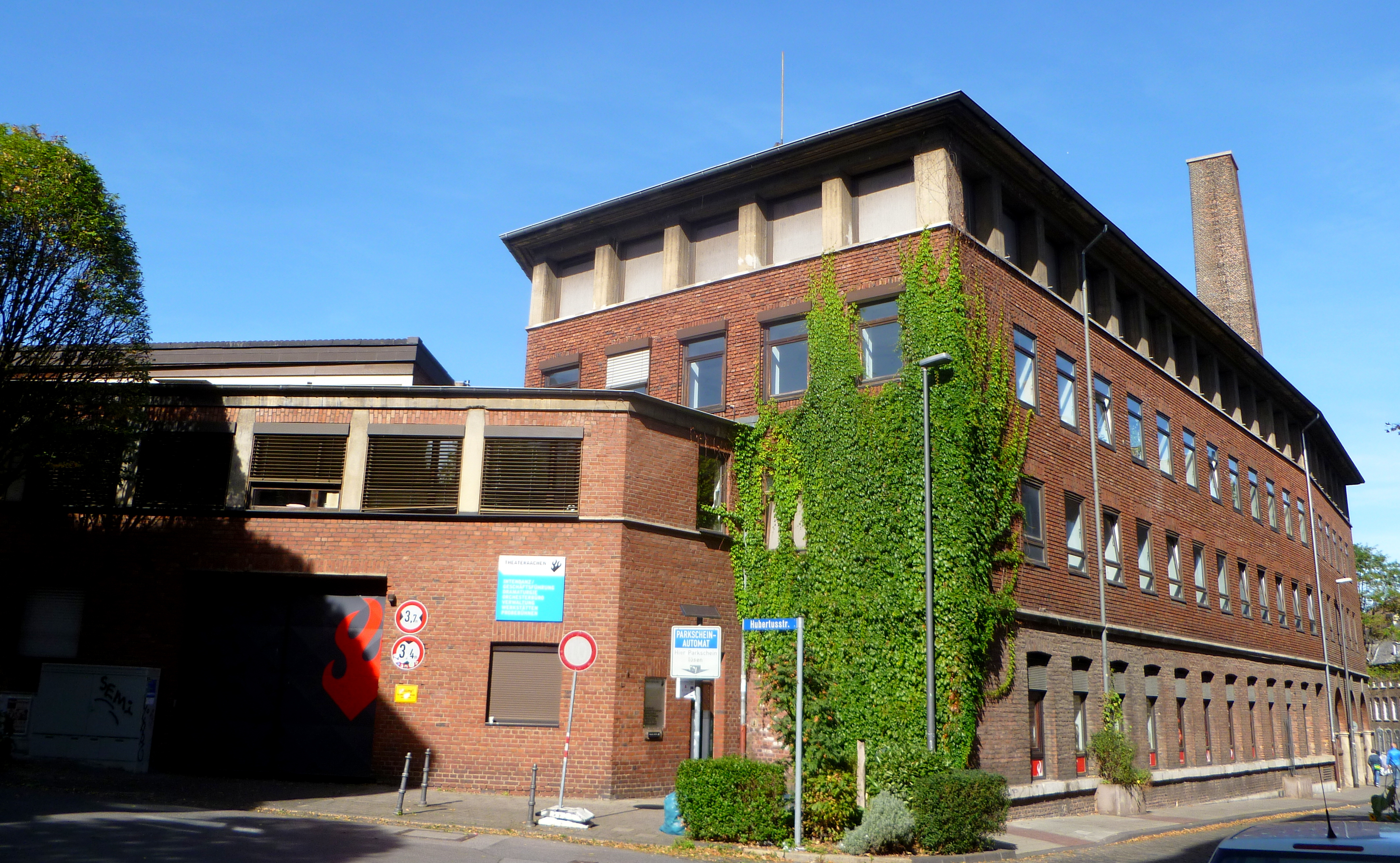 ehem Tuchfabrik Nellessen in der Mörgensstraße in Aachen, heute Außenstelle des Theater Aachens; Baudenkmal